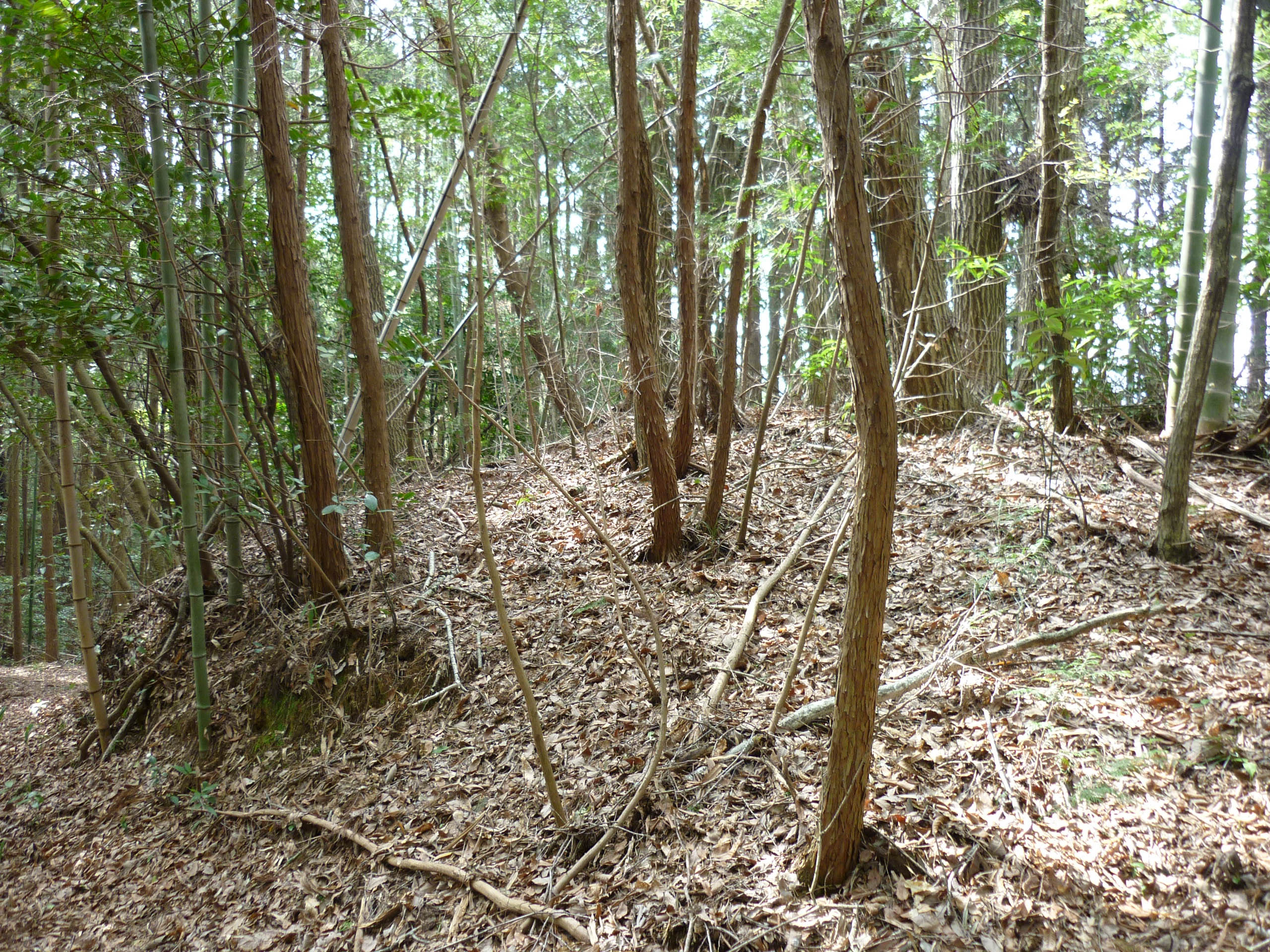 櫓台